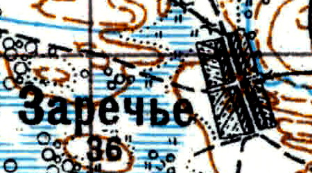 Топографическая карта Ленинградской области, квадрат Vc-29 (Батецкая), деревня Заречье